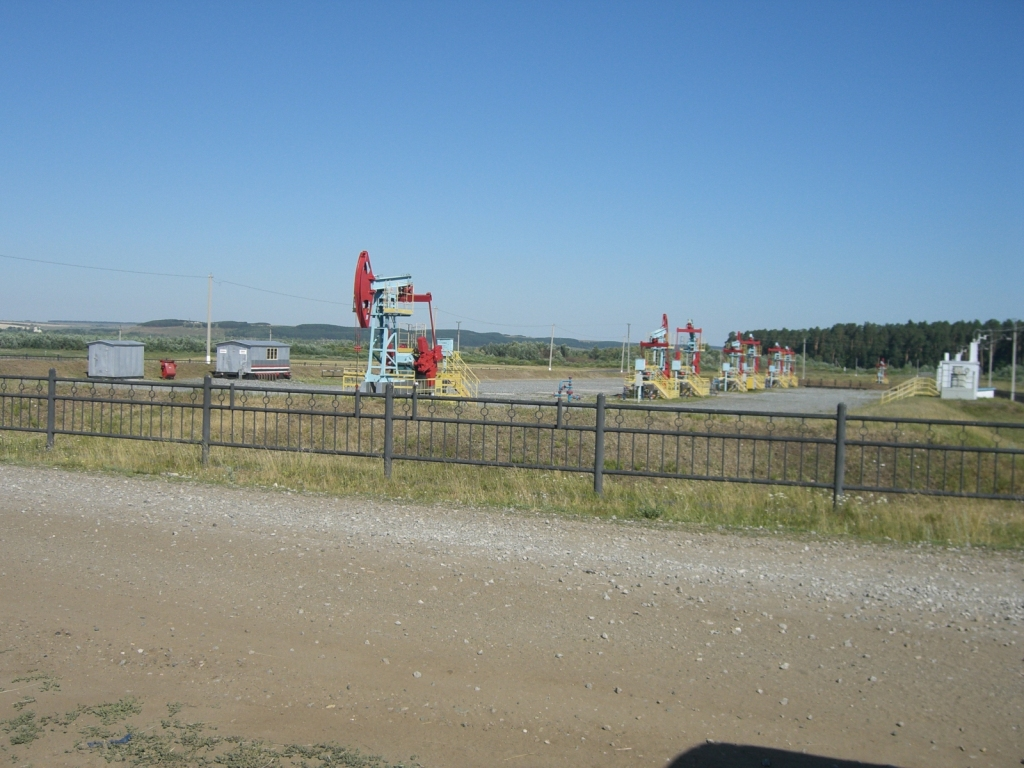 Образцово-показательный куст К-114 на Арланском месторождении